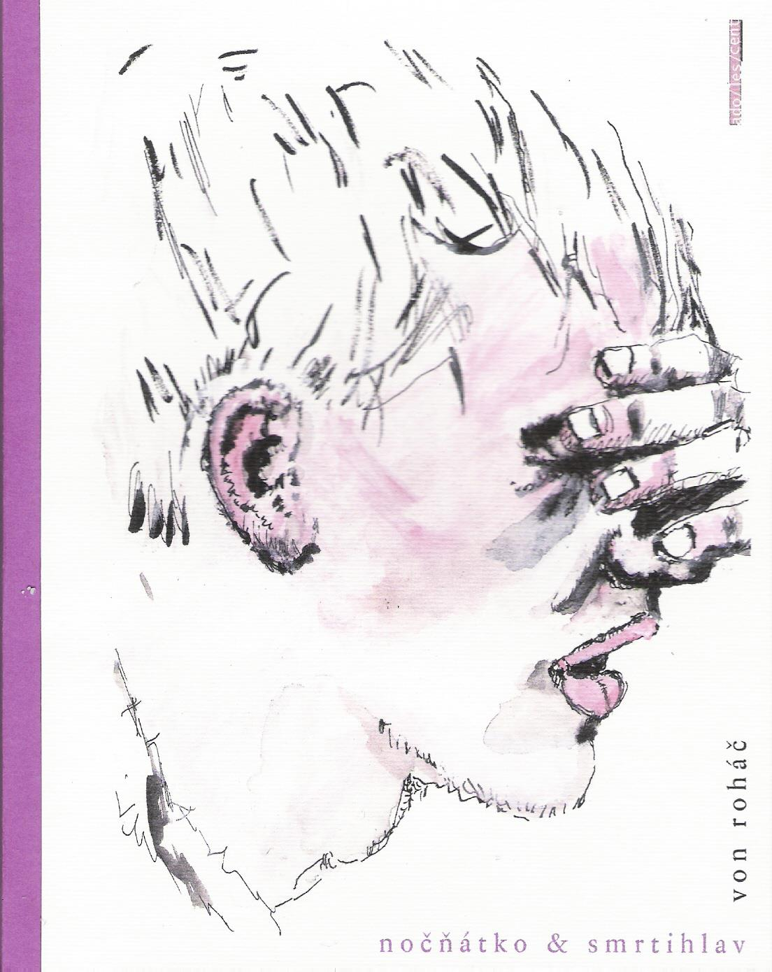 Ilustrace ke sbírce Nočńátko & Smrtihlav.